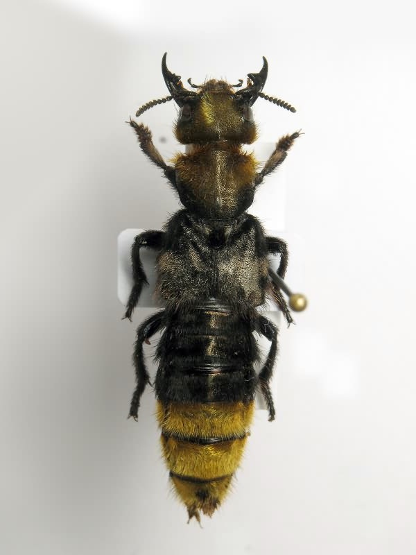 Emus hirtus female Location: Харьковская обл., Люботин (49°56'21.86"N 35°53'02.30"E). В навозе. Date: 18.06.2008 Из коллекции Артура Шеховцова